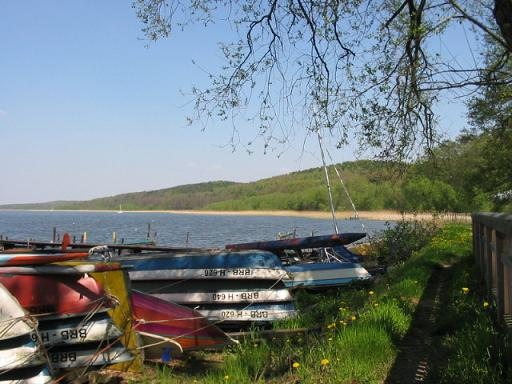 Schwielowsee in Brandenburg, bei Potsdam